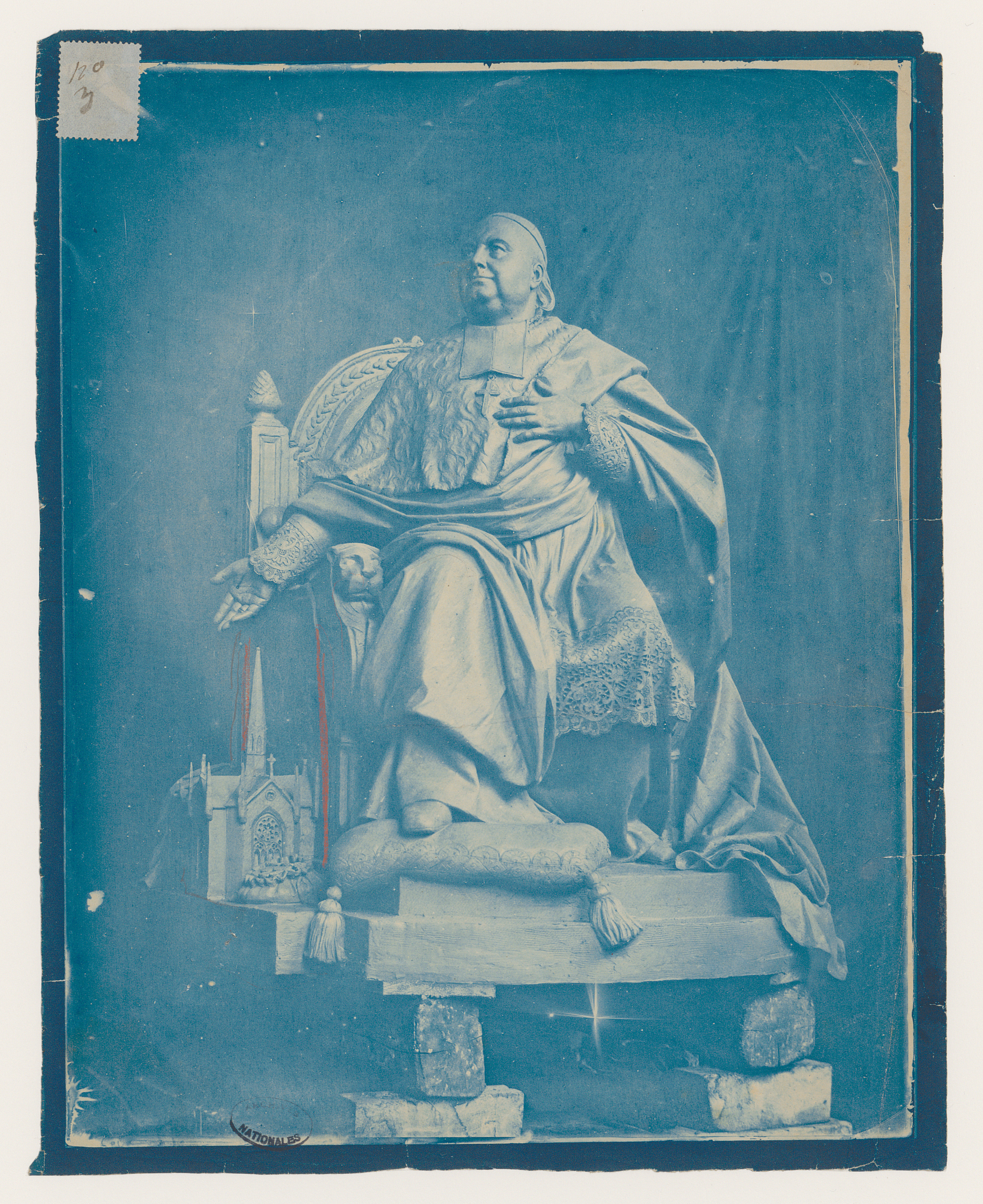 Photographie de la statue du cardinal Mathieu par Charles-Arthur Bourgeois avant son installation dans l’abside de la cathédrale de Besançon. Document issu des dossiers de travaux de restauration des cathédrales (1802-1912), conservés aux Archives nationales (inventaire et autres documents numérisés consultables en ligne).